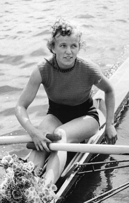 Johanna Knoll Zentralbild Funck- 17.7.1955 DDR-Meisterschaften der Ruderer in Grünau Am Sonntag, dem 17.7.1955, fand auf dem Olympiakurs in Grünau die DDR-Rudermeisterschaft 1955 statt. In allen Wettbewerben gab es packende Kämpfe, die eindeutig den Leistungsanstieg unserer Ruderer unter Beweis stellten. UBz: Im Leichtgewichts-Einer der Frauen siegte Johanna Knoll (SC Wissenschaft DHfK Leipzig).